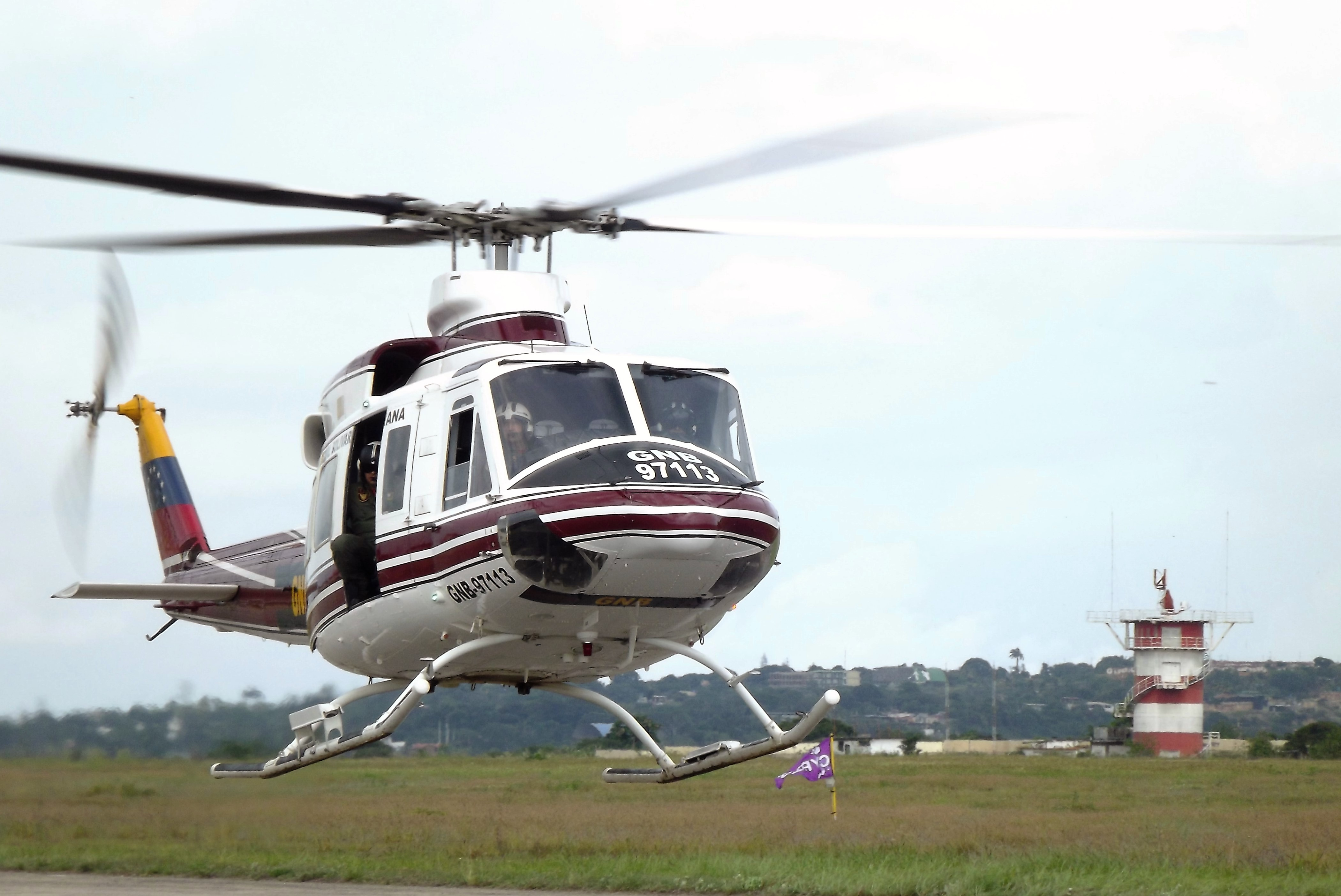 Bell-412EP del Comando Aéreo de la GNBV de Venezuela